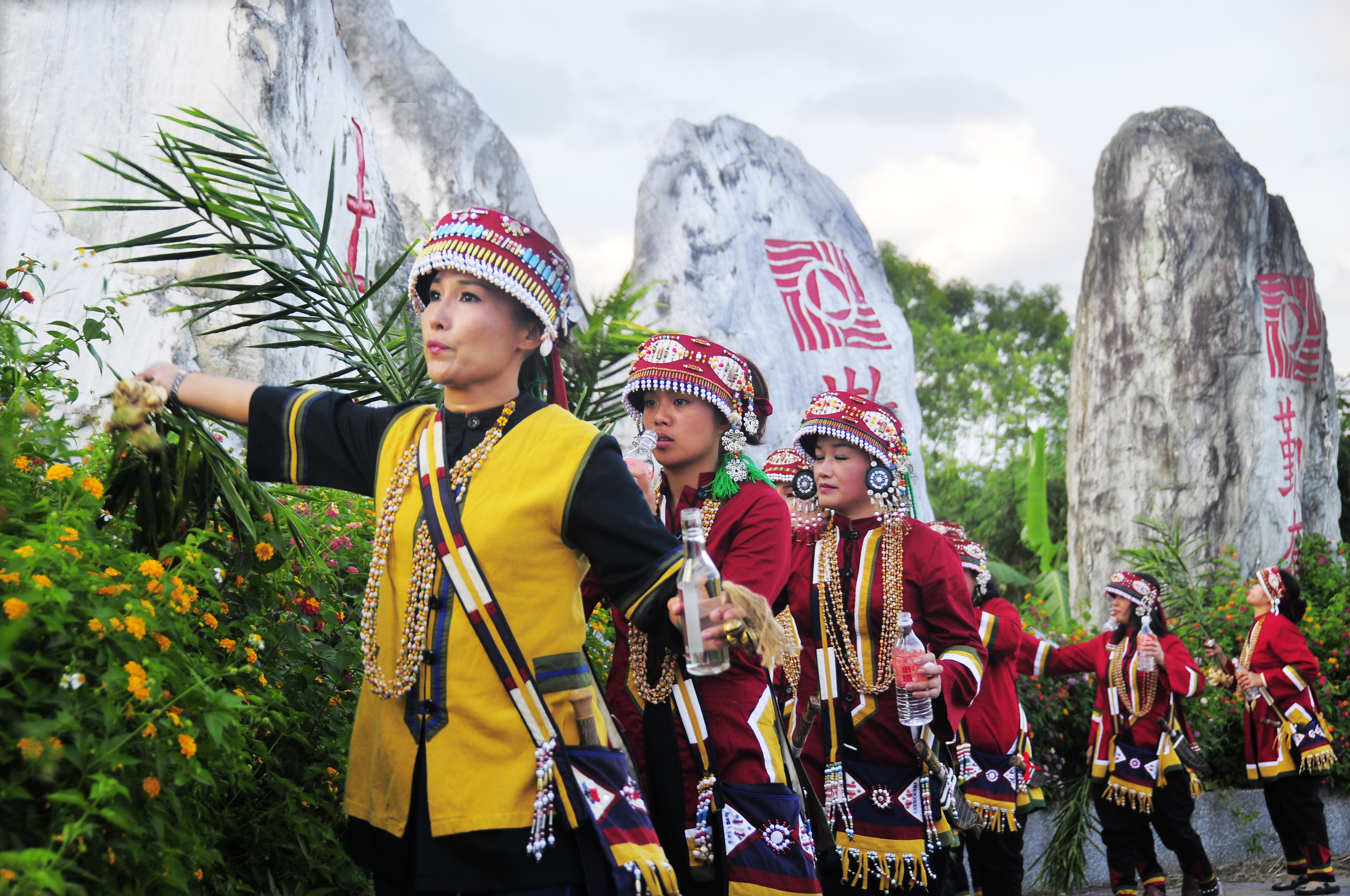 撒奇萊雅族祝禱司